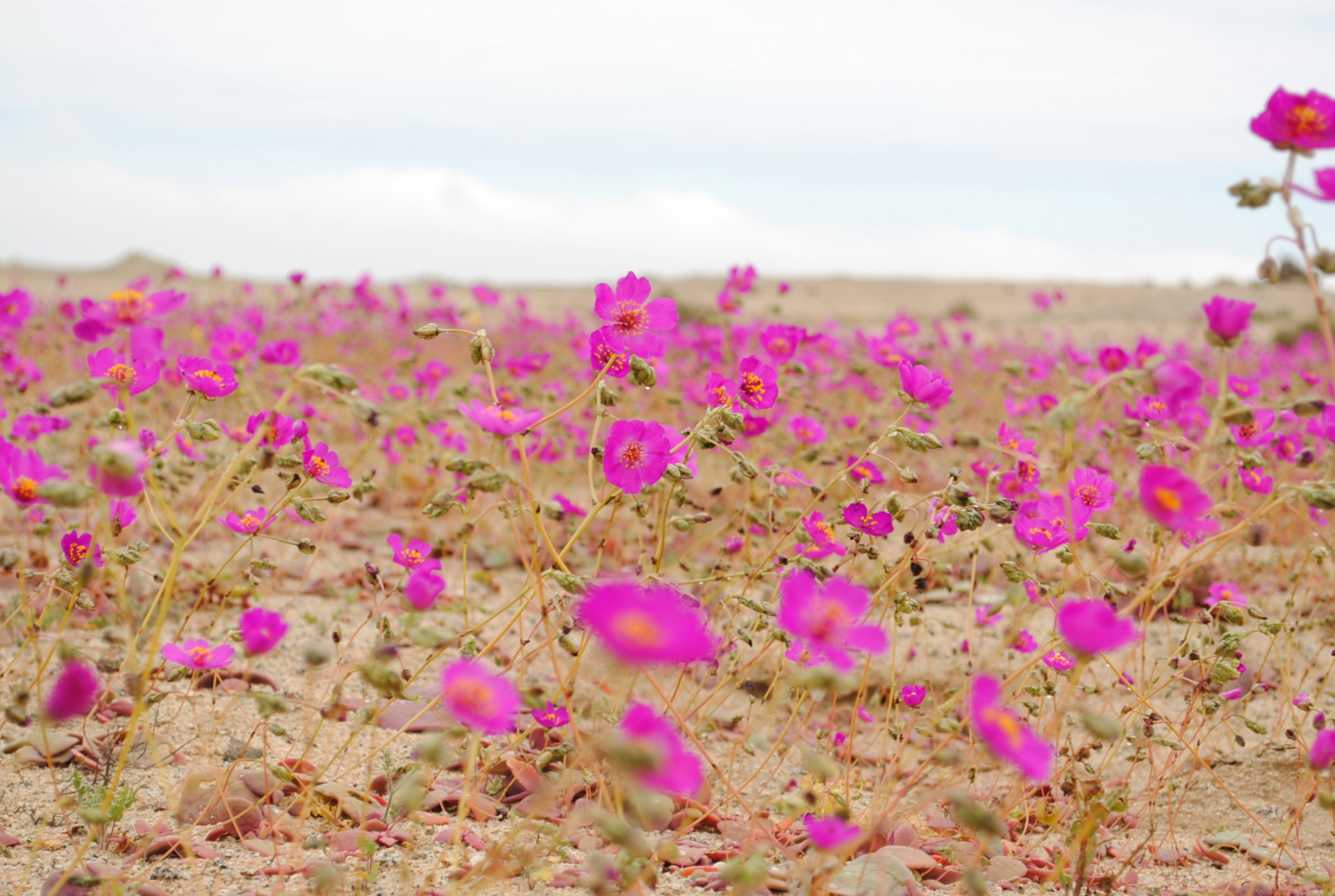 Barranquilla, III Región de Atacama, Chile.